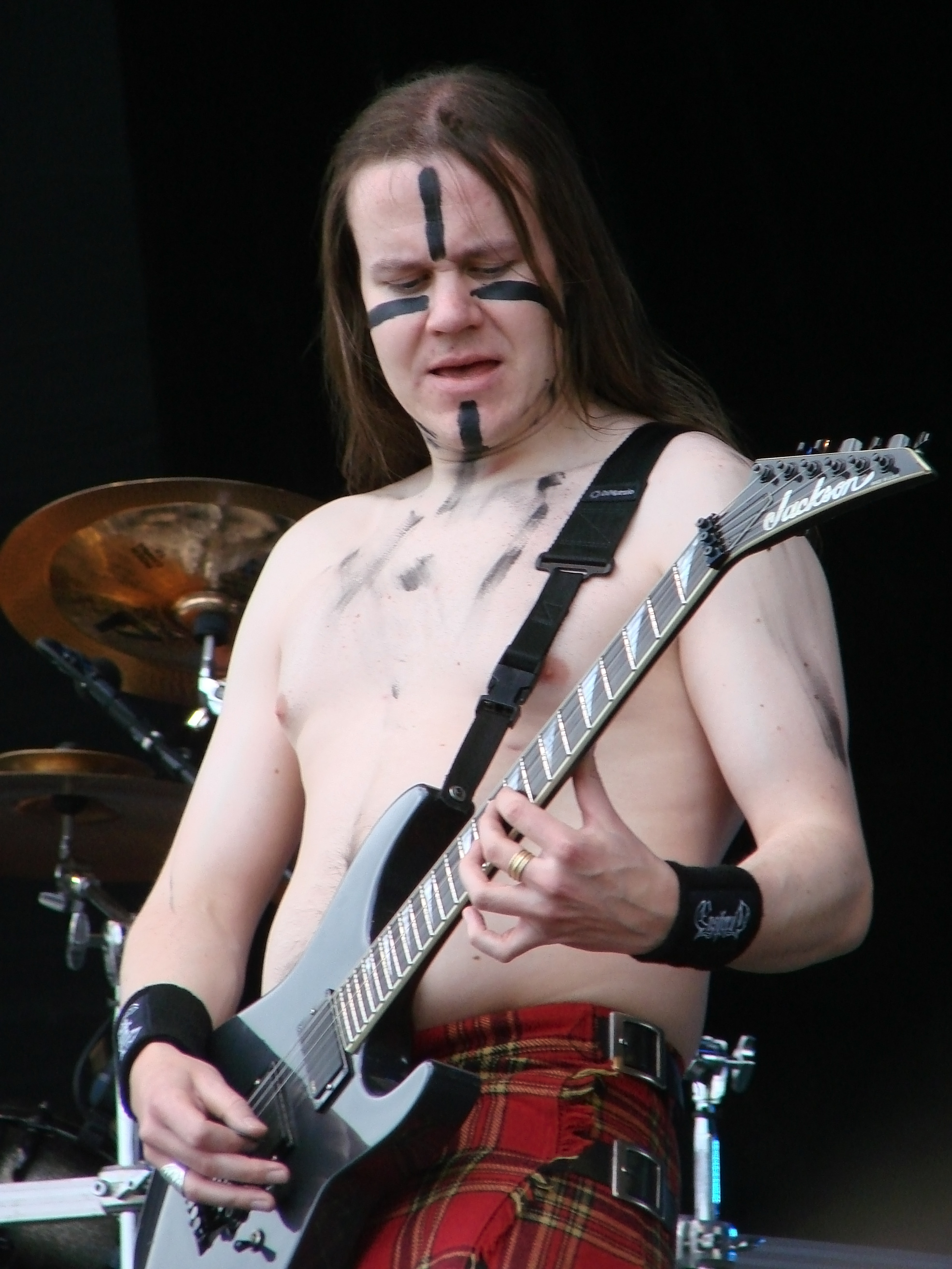 Ensiferum au Hellfest 2010, à Clisson, le 20 Juin 2010 : Markus Toivonen.